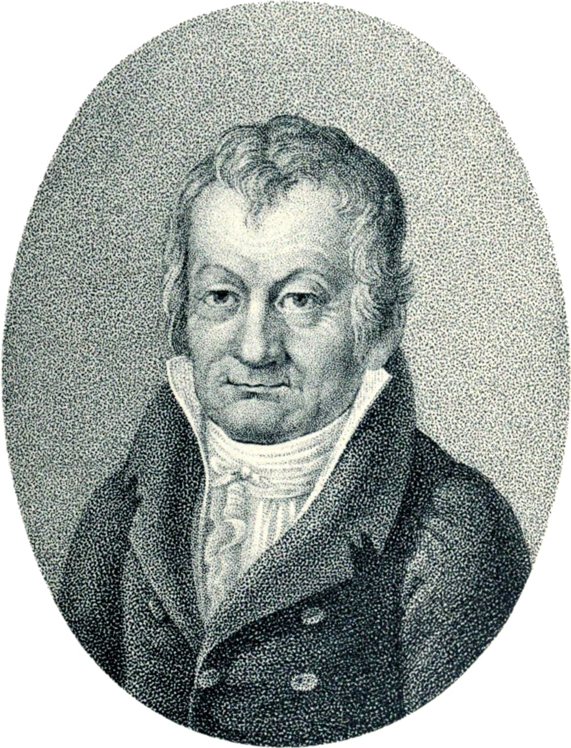 Hornjoserbsce: hsb:Karl Gottlob von Anton (1751–1818); jurist, filolog, historikar, załožer Hornjołužiskeje towaršnosće wědomosćow